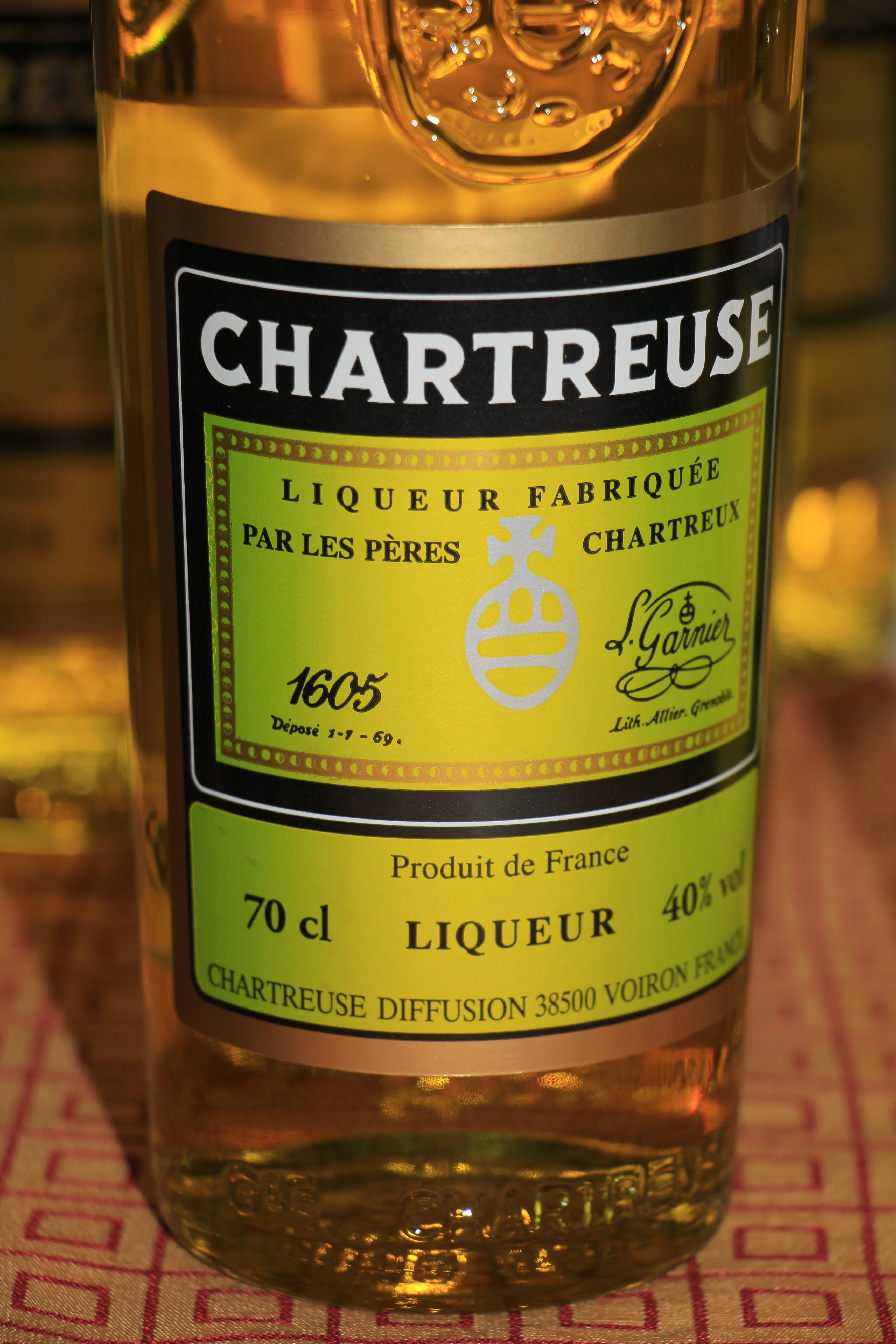 Liquör Chartreuse in der Kartause Gaming